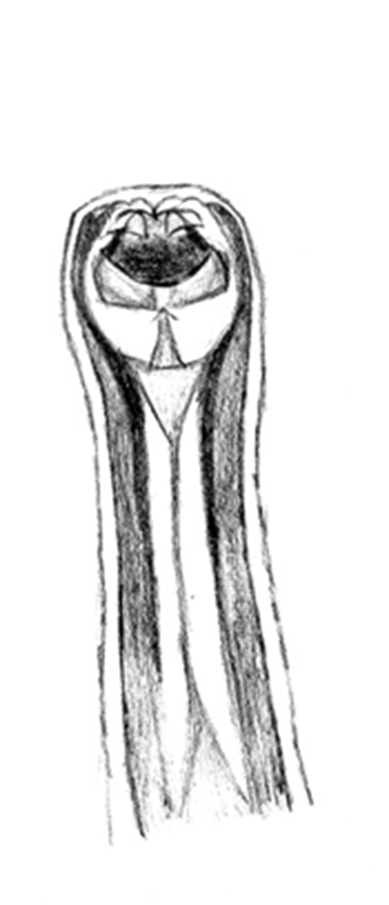 Imagem morfológica do Ancylostoma caninum.